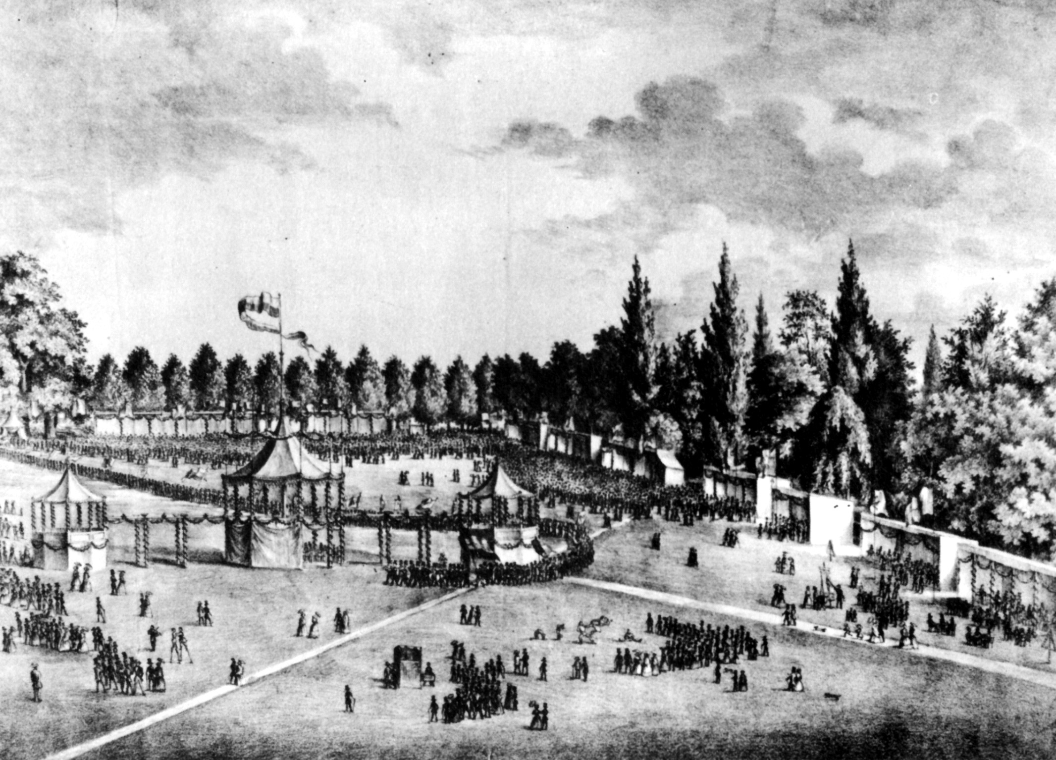 Das Lübecker Volks- und Erinnerungsfest im Jahre 1854